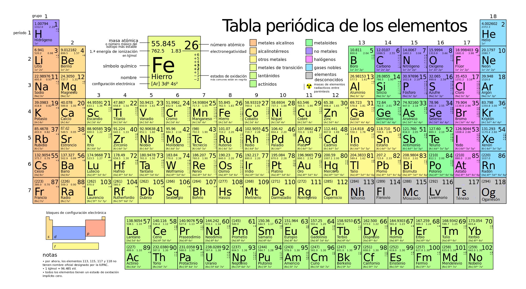 Desde el 28 de Noviembre de 2016, en la tabla periódica hay cuatro nuevos elementos químicos: El 113: (Nh) Nihonio, ha sido descubierto en Japón. El 115: (Mc) Moscovio, en Moscú, (Rusia). El 117: (Ts) Ténnesso, en Tennessee, (EEUU). El 118: (Og) Oganesón, en honor al físico ruso Yuri Oganessian.